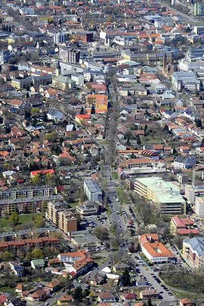 Légi fotó Nyíregyházáról